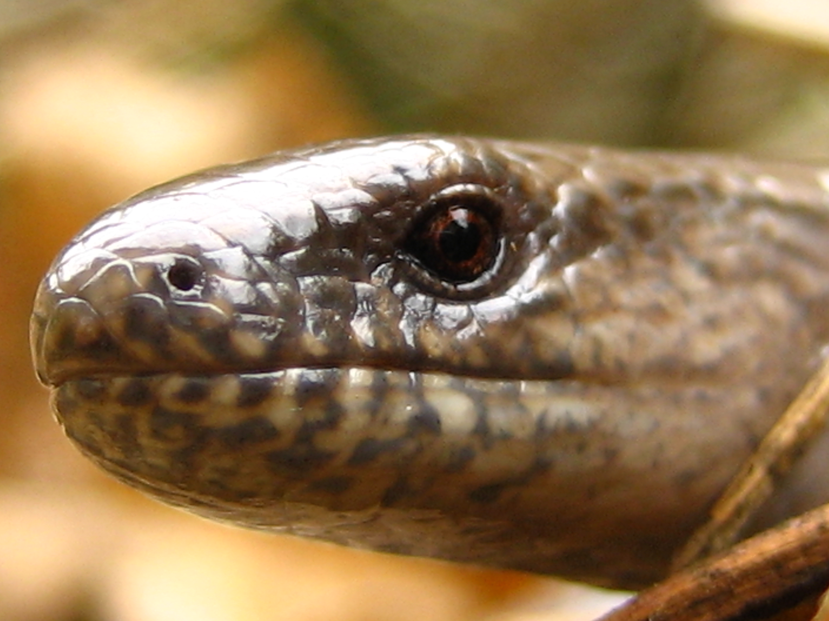 Anguis fragilis